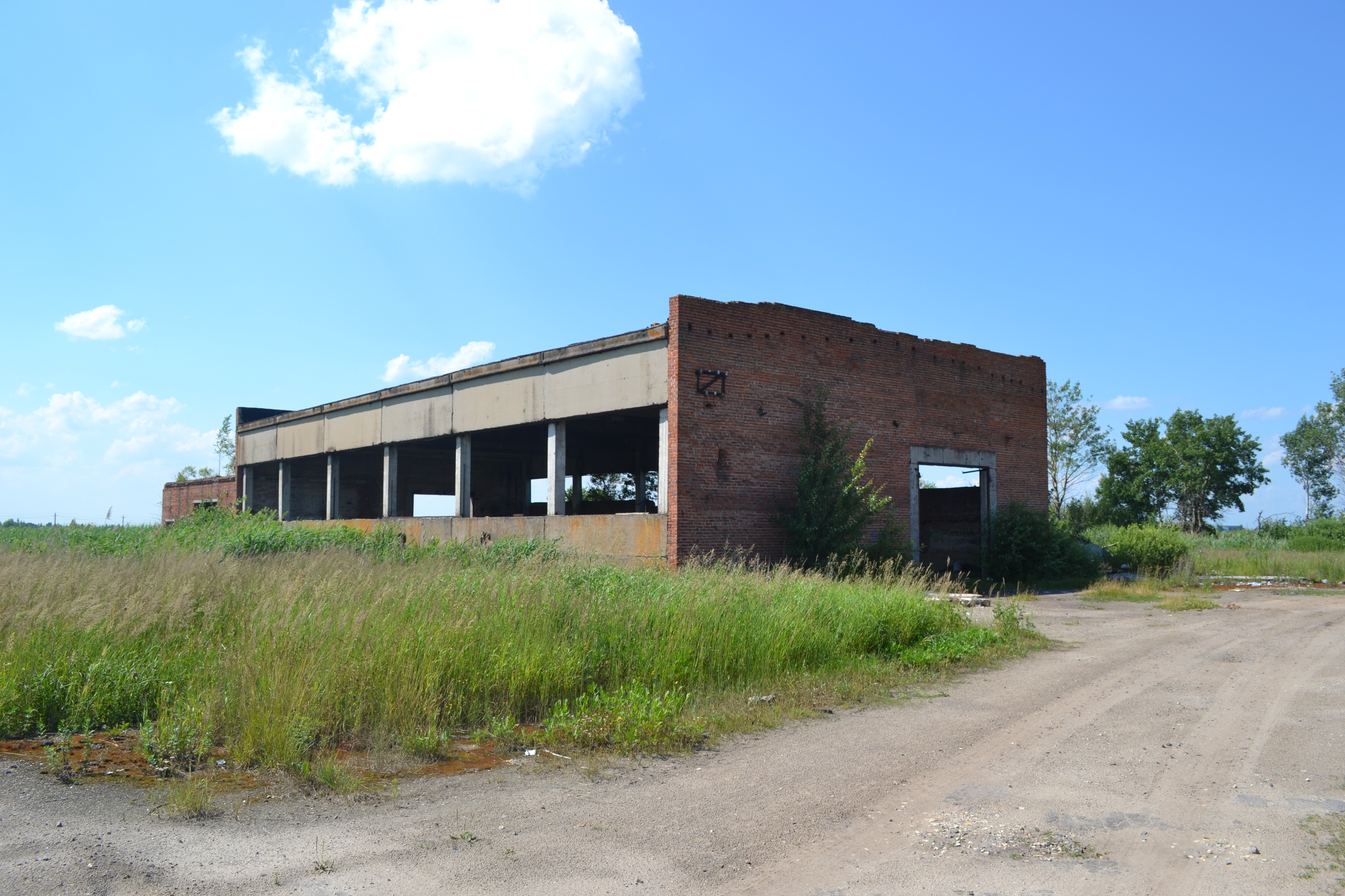 Заброшенная ферма в Старо-Черкасово (Шатурский район)